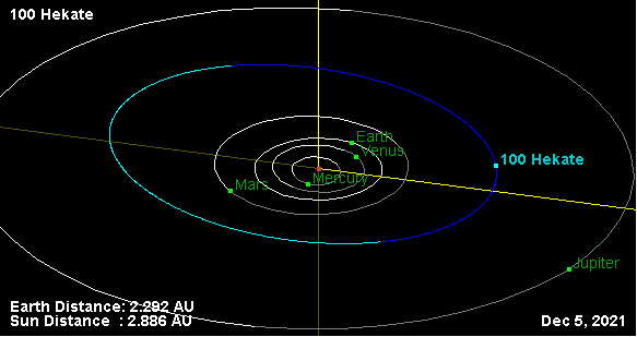 Орбита астероида (100) Геката